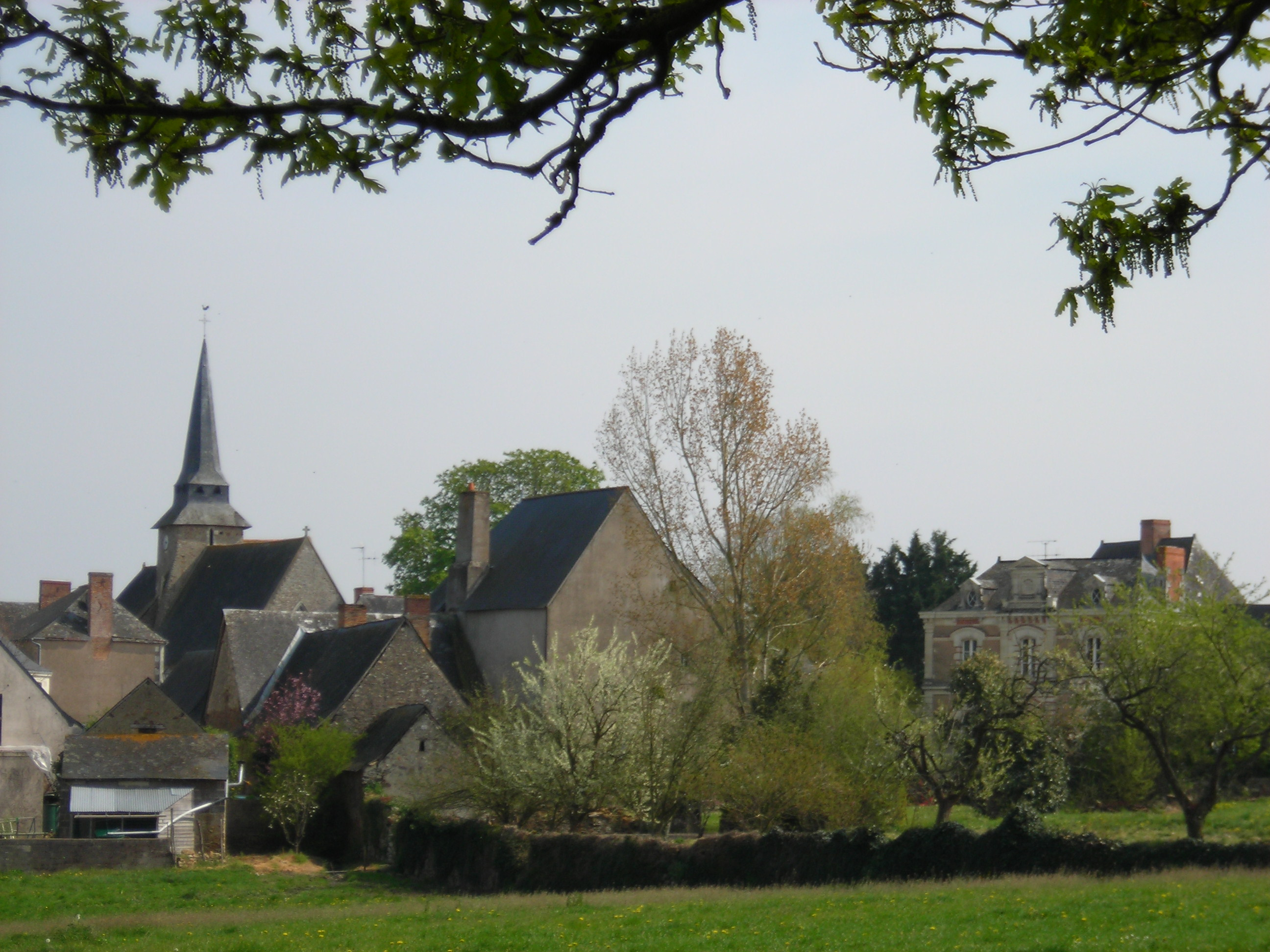 champteusse sur baconne derriere les arbres